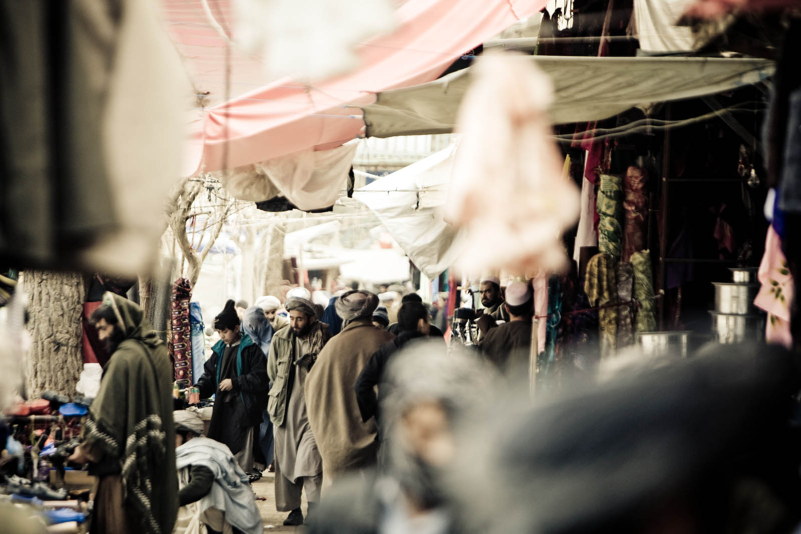 ファーリヤーブ州マイーマナの様子